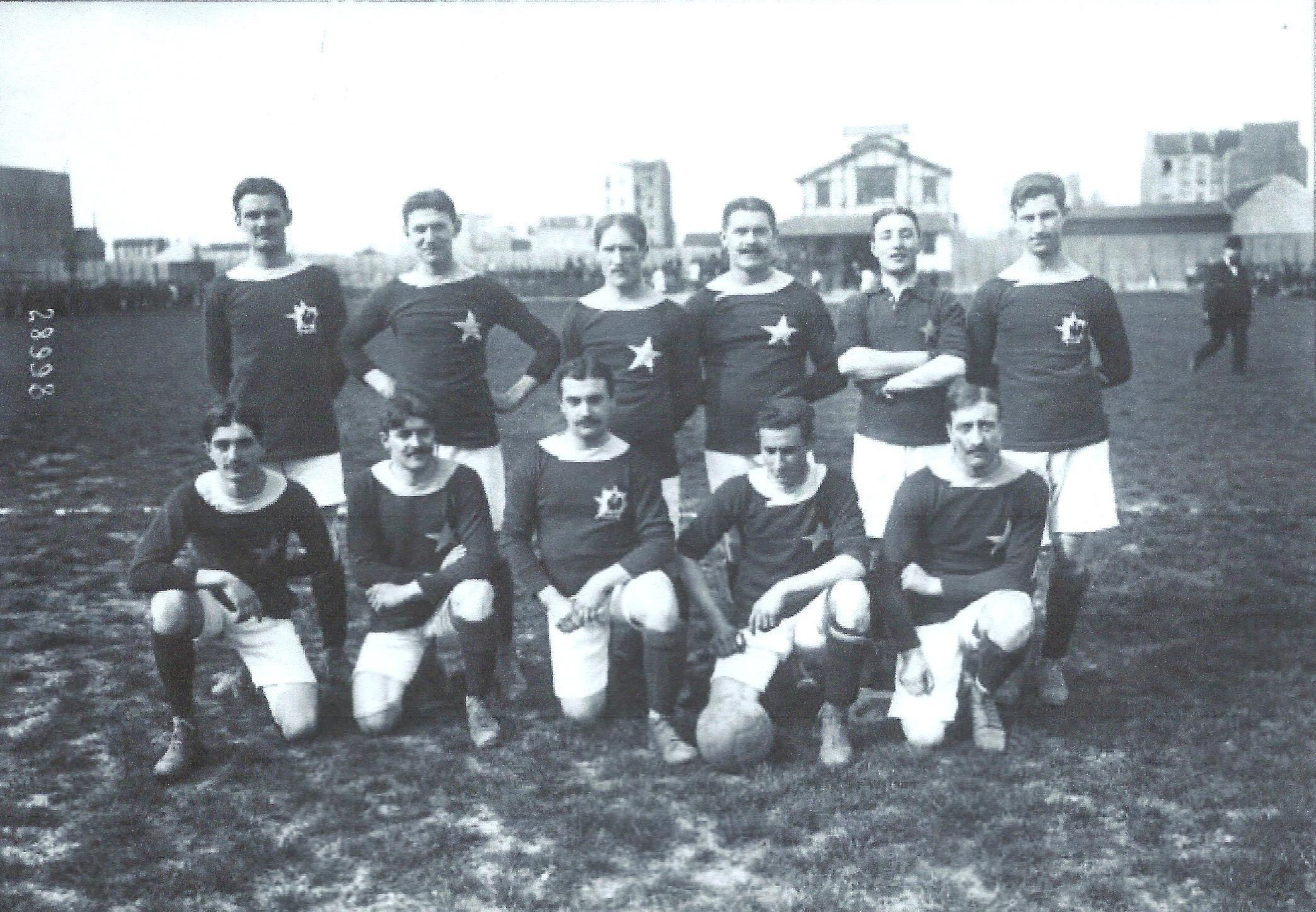 Equipe de Football de l'Etoile des 2 lacs, championne de France FGSPF en 1900